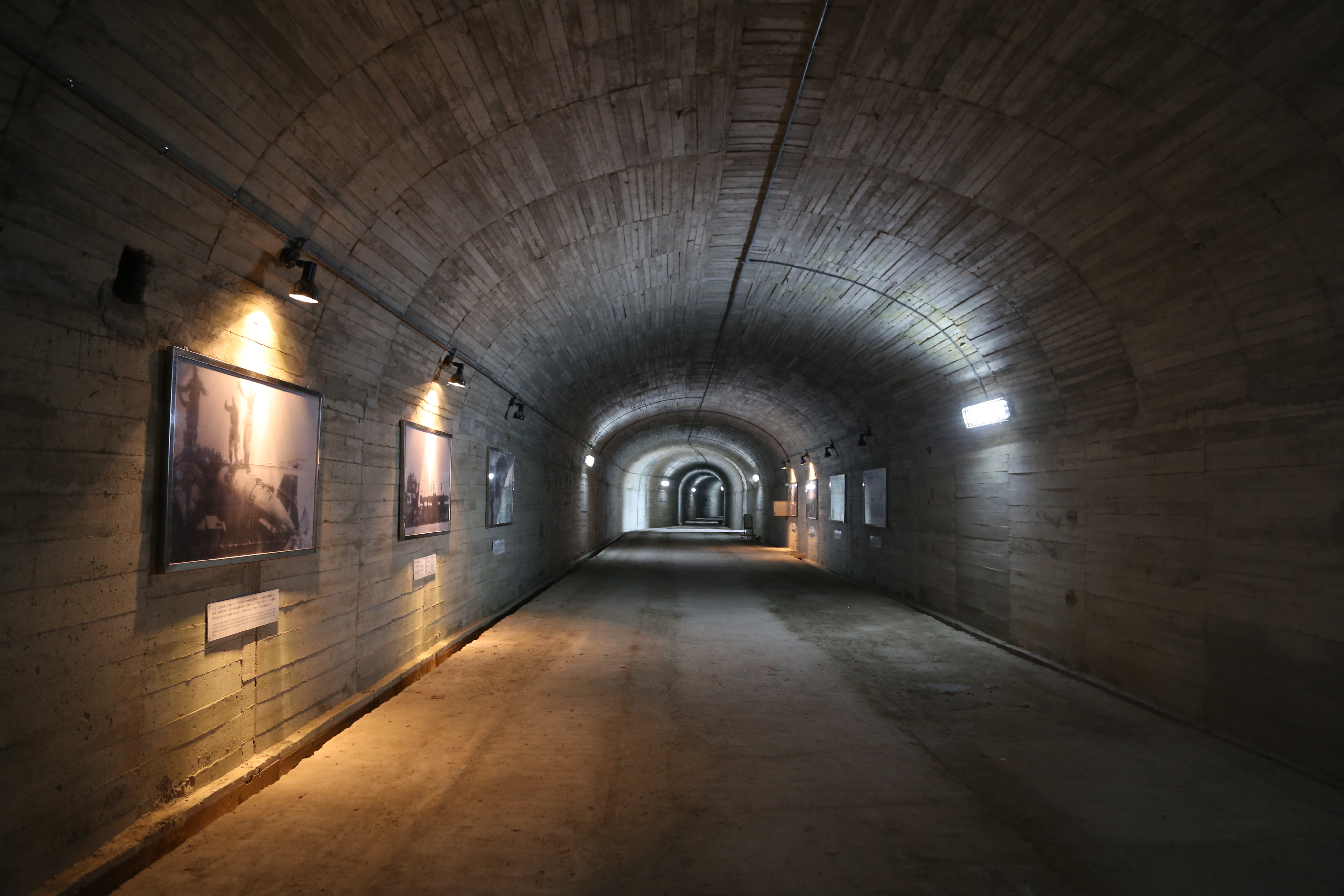 山口県周南市沖の大津島の魚雷実験場へと続くトンネル